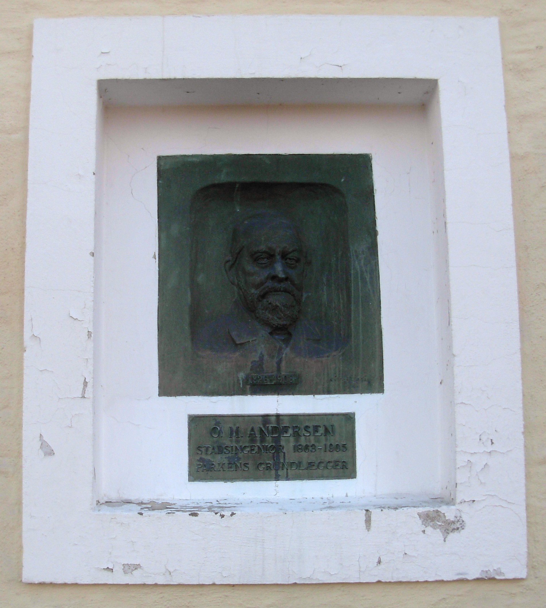 Relieff (plakett) på nordsiden av Tårnhuset på St. Hanshaugen (parken), Oslo. Stadsingeniør O. M. Andersen ledet kommunens arbeid med opparbeidelse av parken fra 1860-årene.